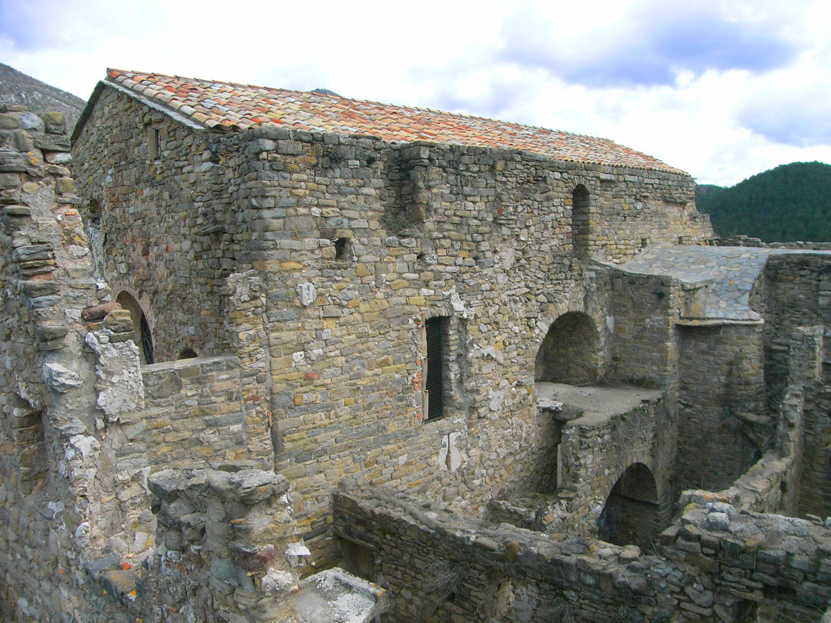 Santa Maria de Lillet, des de la bastida d'observació